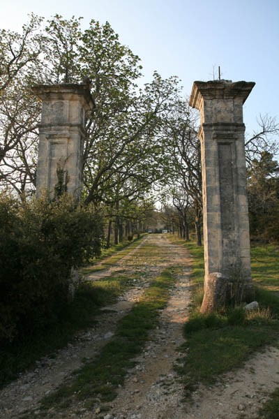 Village of Vitrolles en Luberon in Vaucluse, France